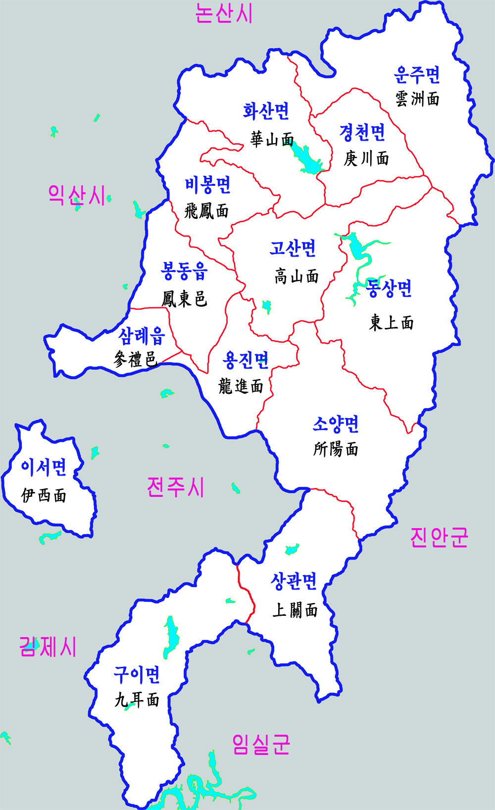 전북 완주군 행정구역도